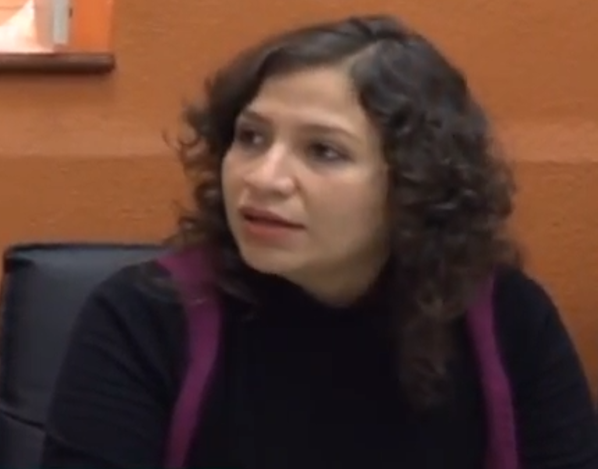 Ministra Ariana Campero en mayo de 2018